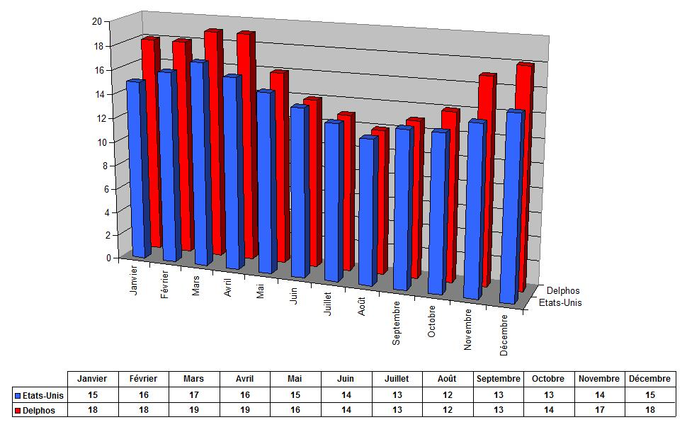 Vitesse du vent, en km/h, à Delphos (Ohio - Etats-Unis)